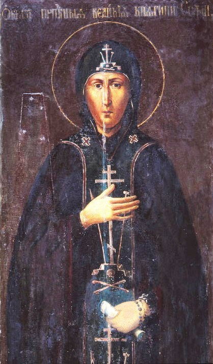 Преподобная София Суздальская. Икона из покровского монастыря, суздаль